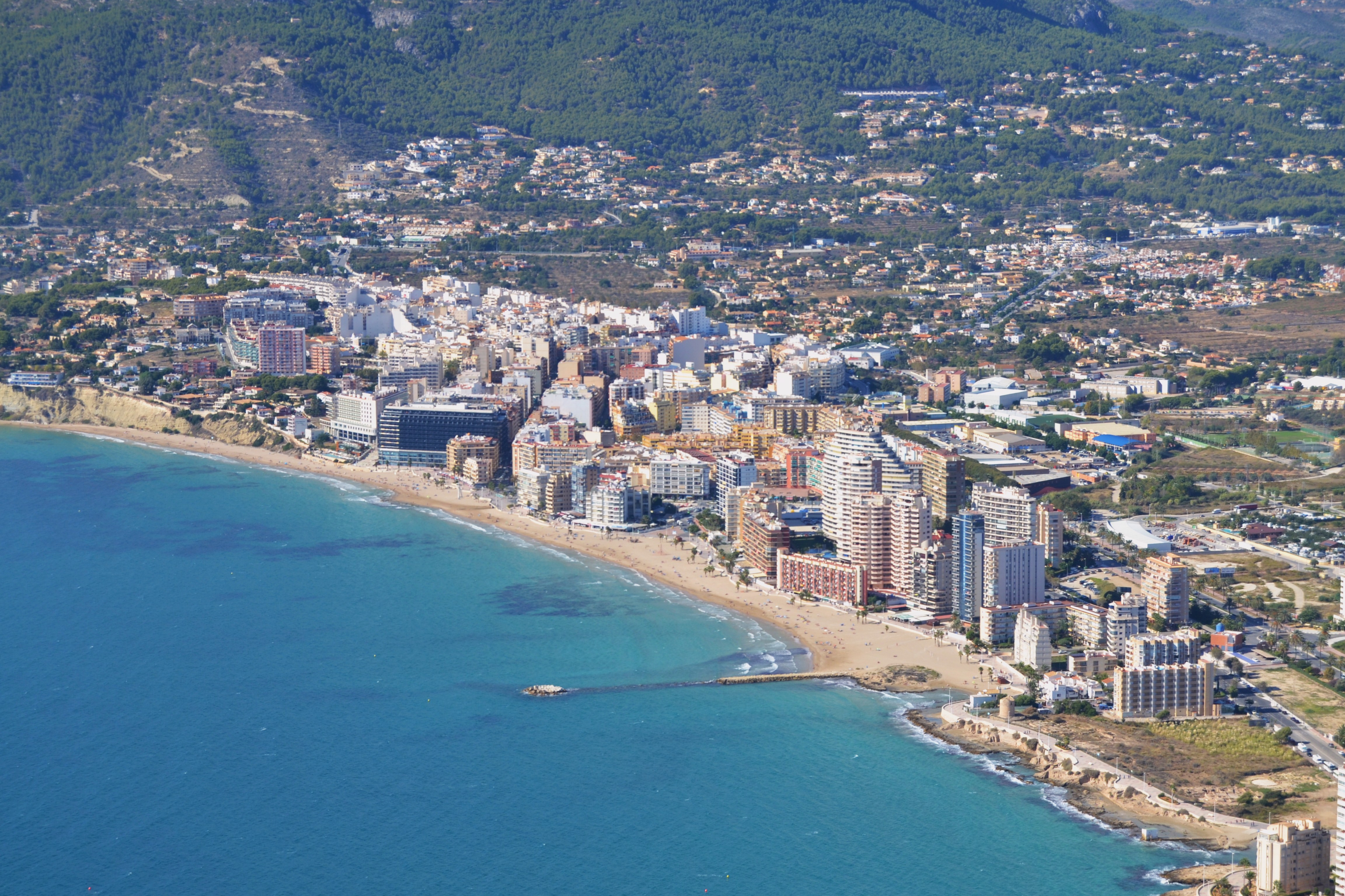 Calp des del Penyal d'Ifac.